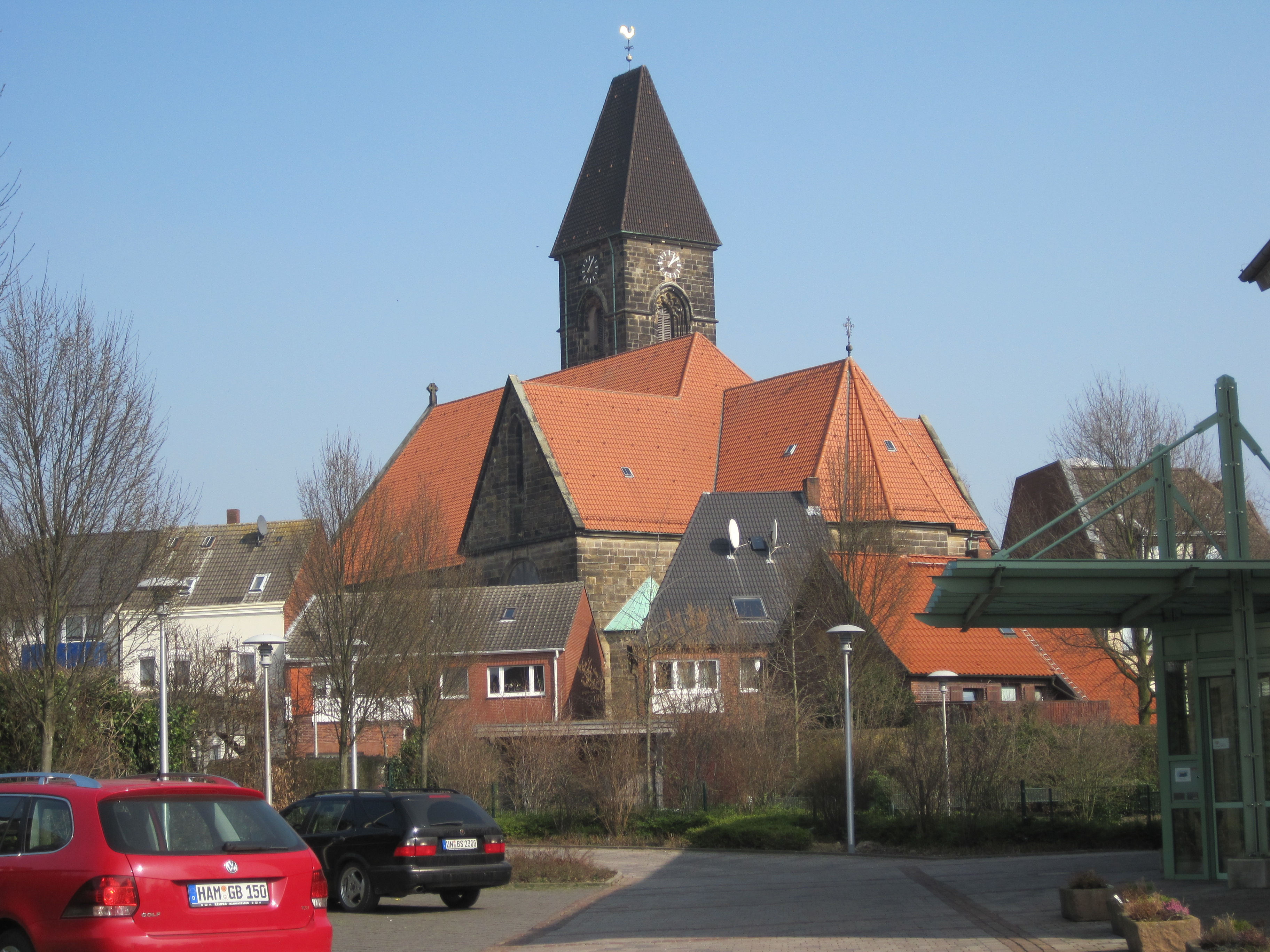 Das Foto zeigt die St. Stephanus-Kirche in Hamm-Bockum-Hövel.